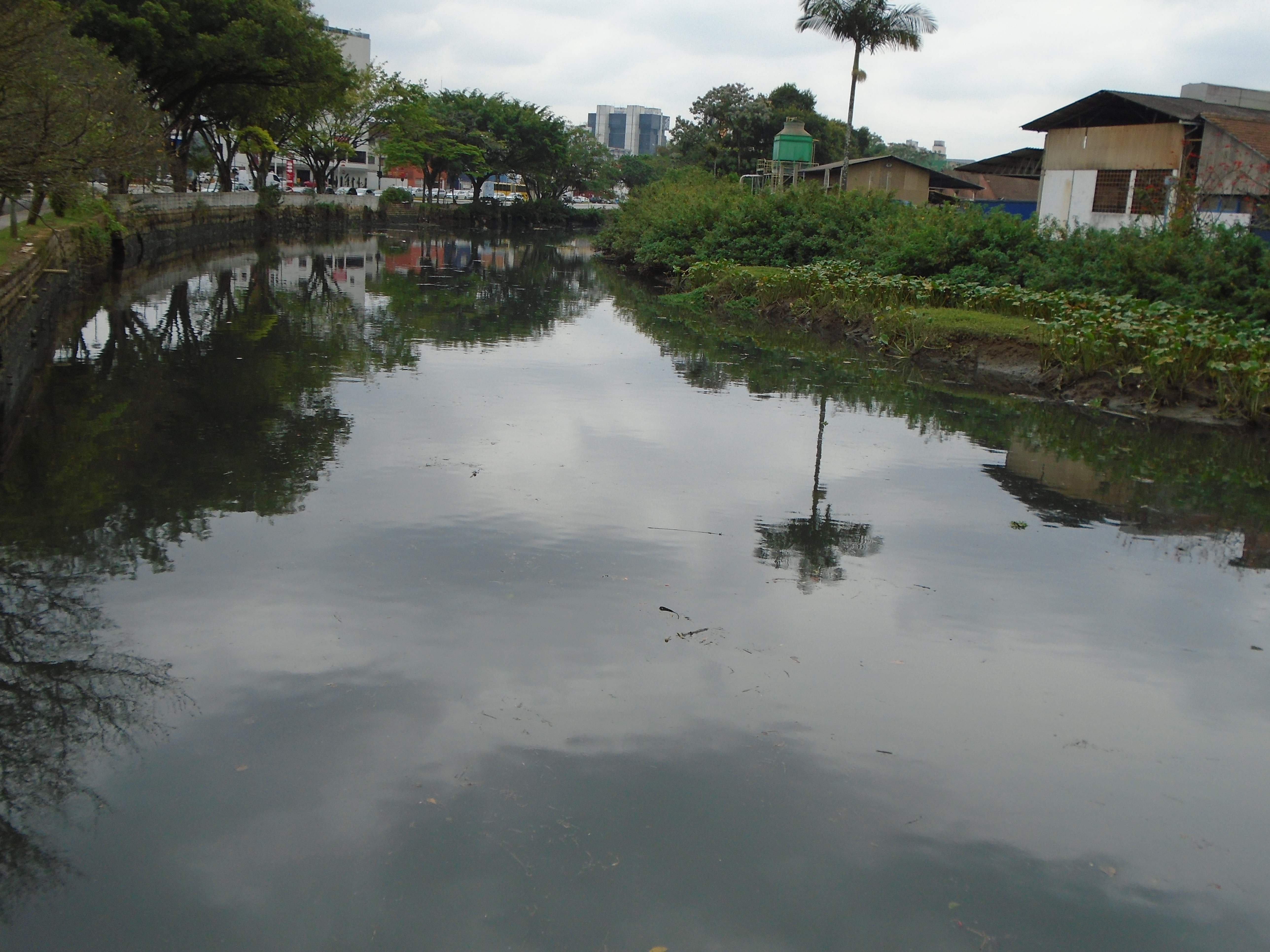 Rio Cachoeira (Joinville, Brasil)